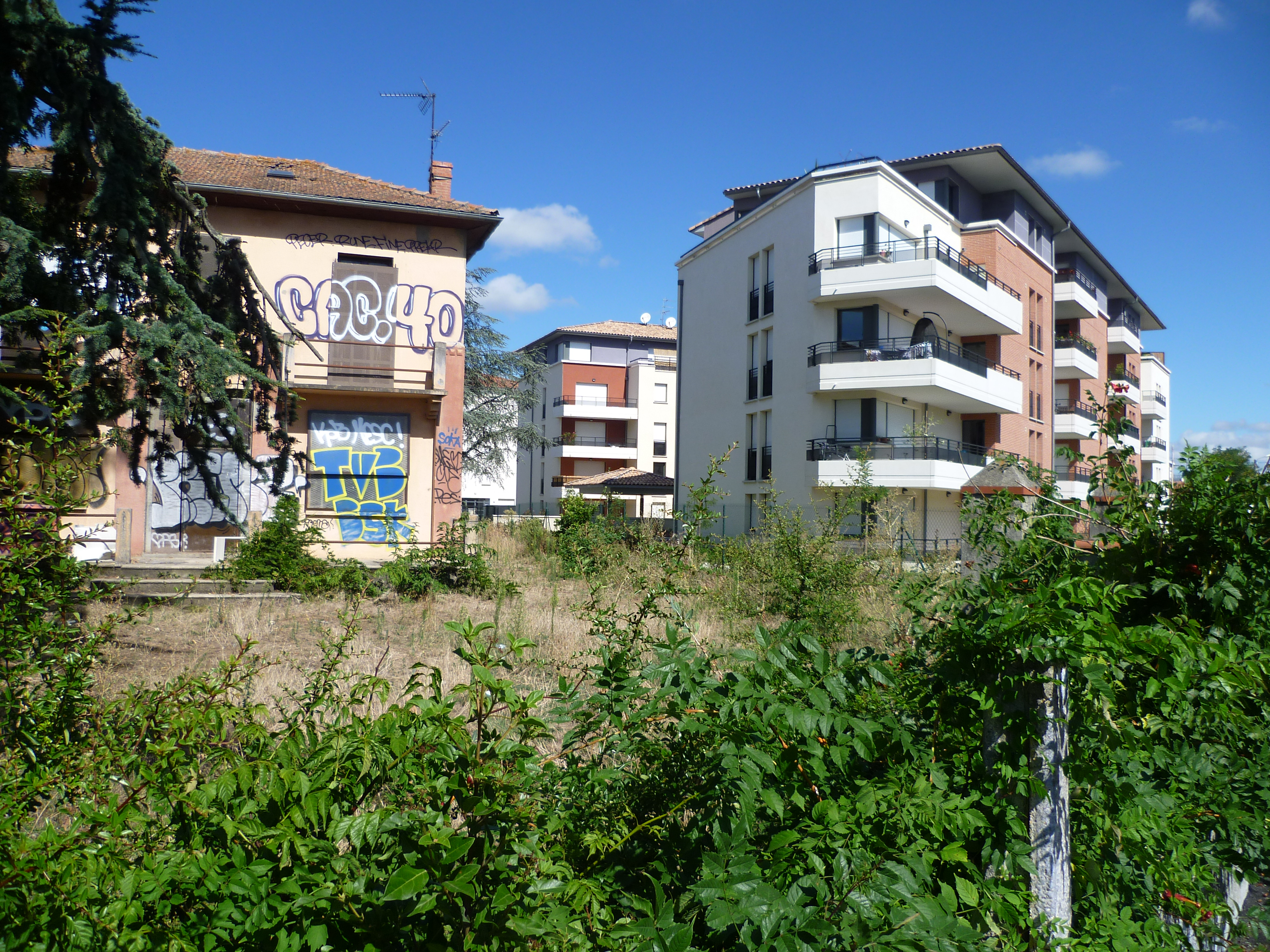 (Toulouse (Haute-Garonne, France) : Maison abandonnée et nouveaux immeubles de logement, avenue des Arènes Romaines à Ancely.